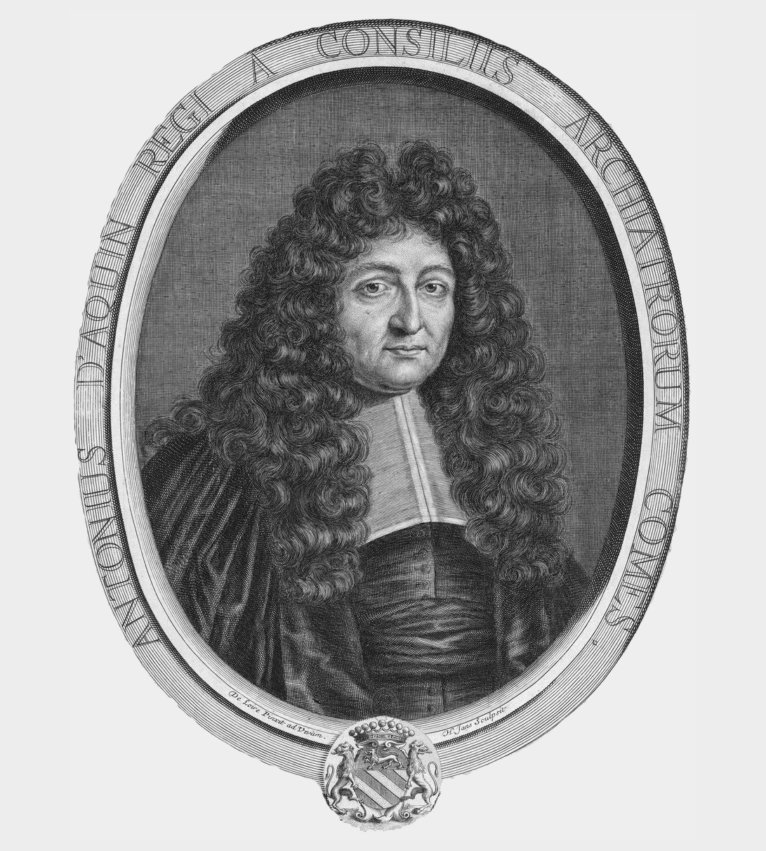 Portrait von Antoine d'Aquin